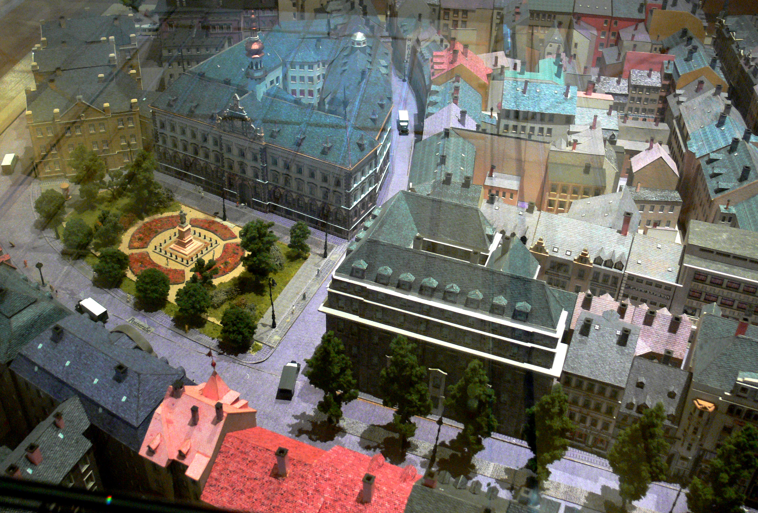 Modell der Chemnitzer Innenstadt (vor der Zerstörung im Zweiten Weltkrieg), Schloßbergmuseum Chemnitz